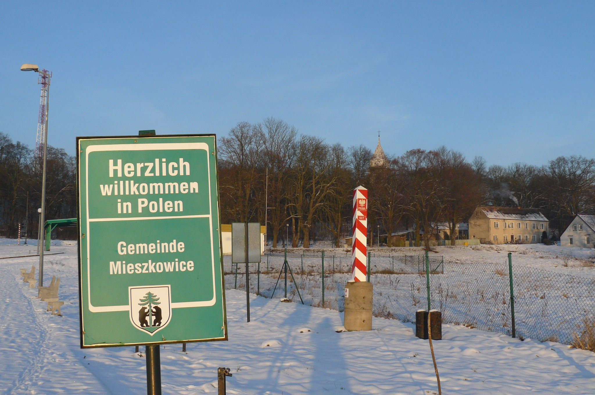 Gozdowice. Prom.